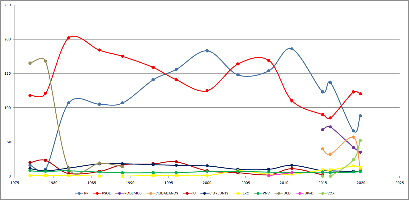 Número de diputados por partido a lo largo de la historia de la democracia española.